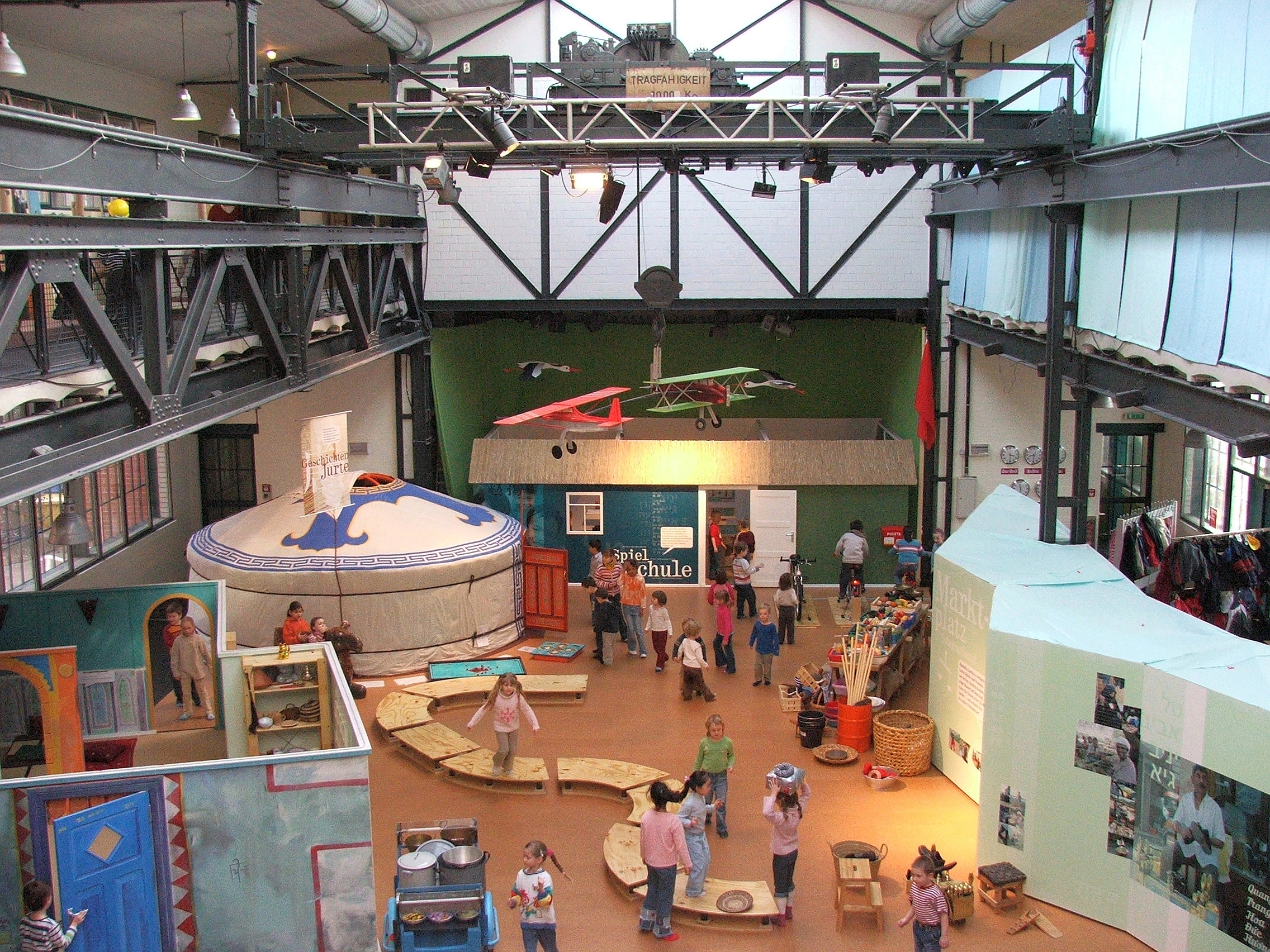 Das Bild zeigt die Ausstellungshalle des Labyrinth Kindermuseums in Berlin